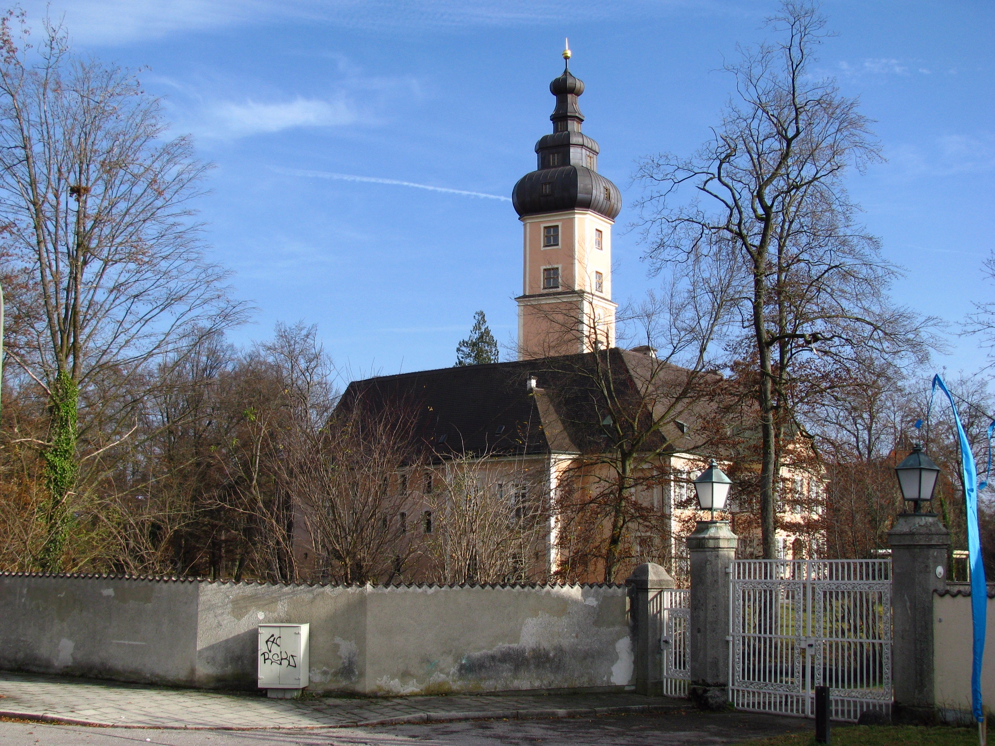 Schloss Planegg mit Schlossmauer und Tor